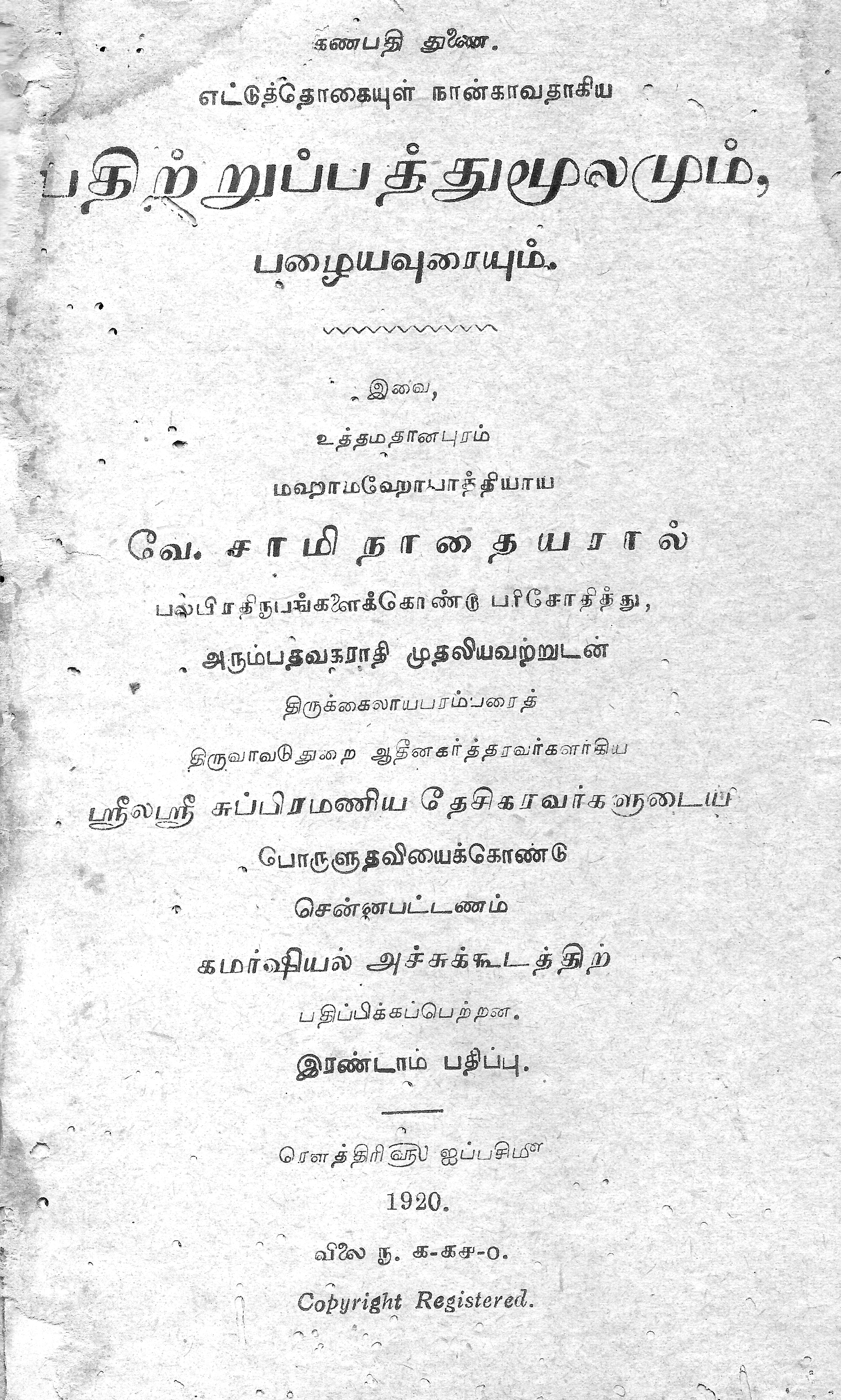 பதிற்றுப்பத்து மூலமும் பழைய உரையும், பதிப்பு 1920, முதல் பக்கம். First page of a literary work in Tamil “Ten Tens” belongs to first century B. C. published in 1920.